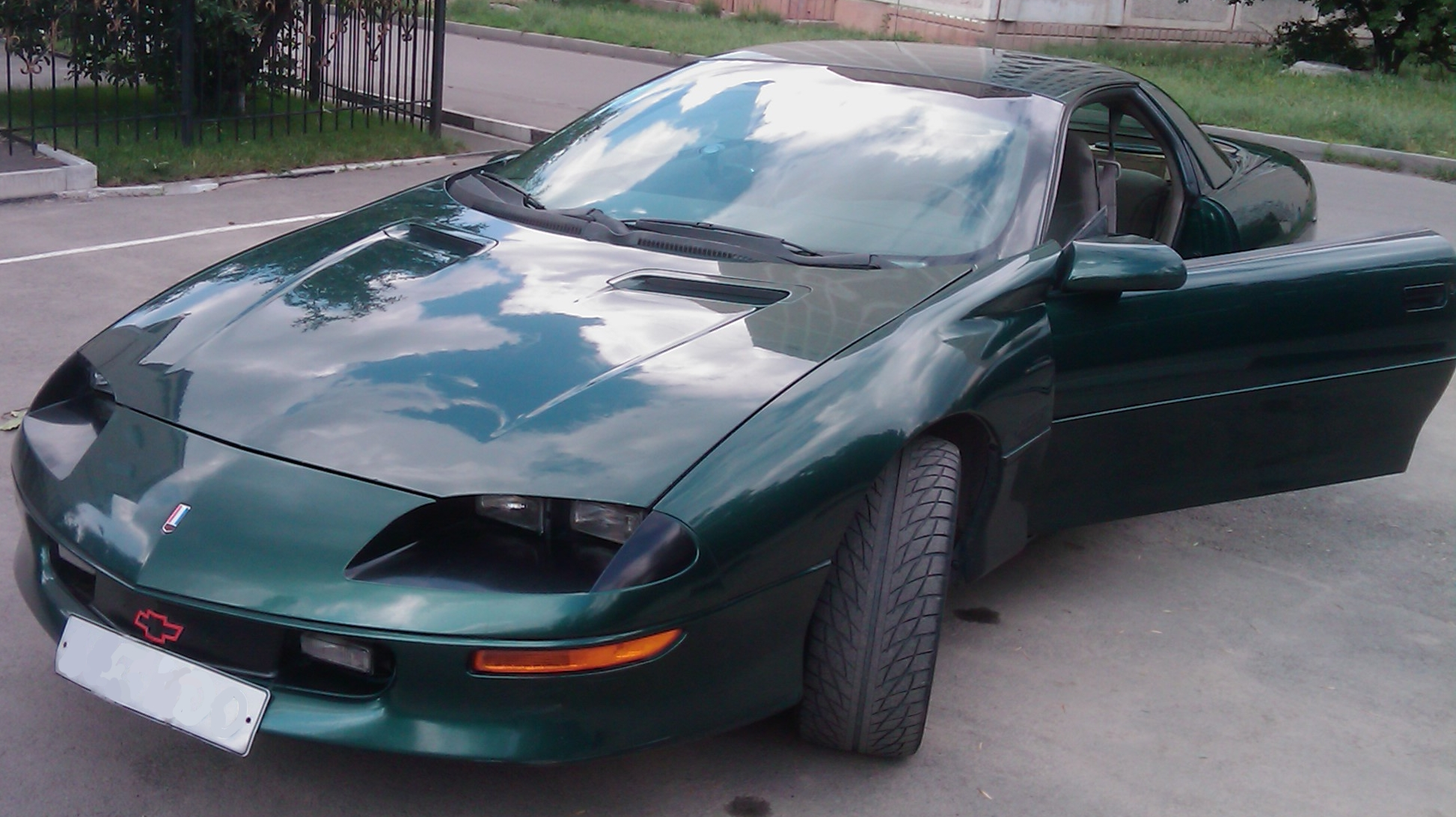 модель выпускавшаяся с 4х фарной мордой, в вики почемуто нет, я хочу добавить описание и возможно отличие от 2х фарной